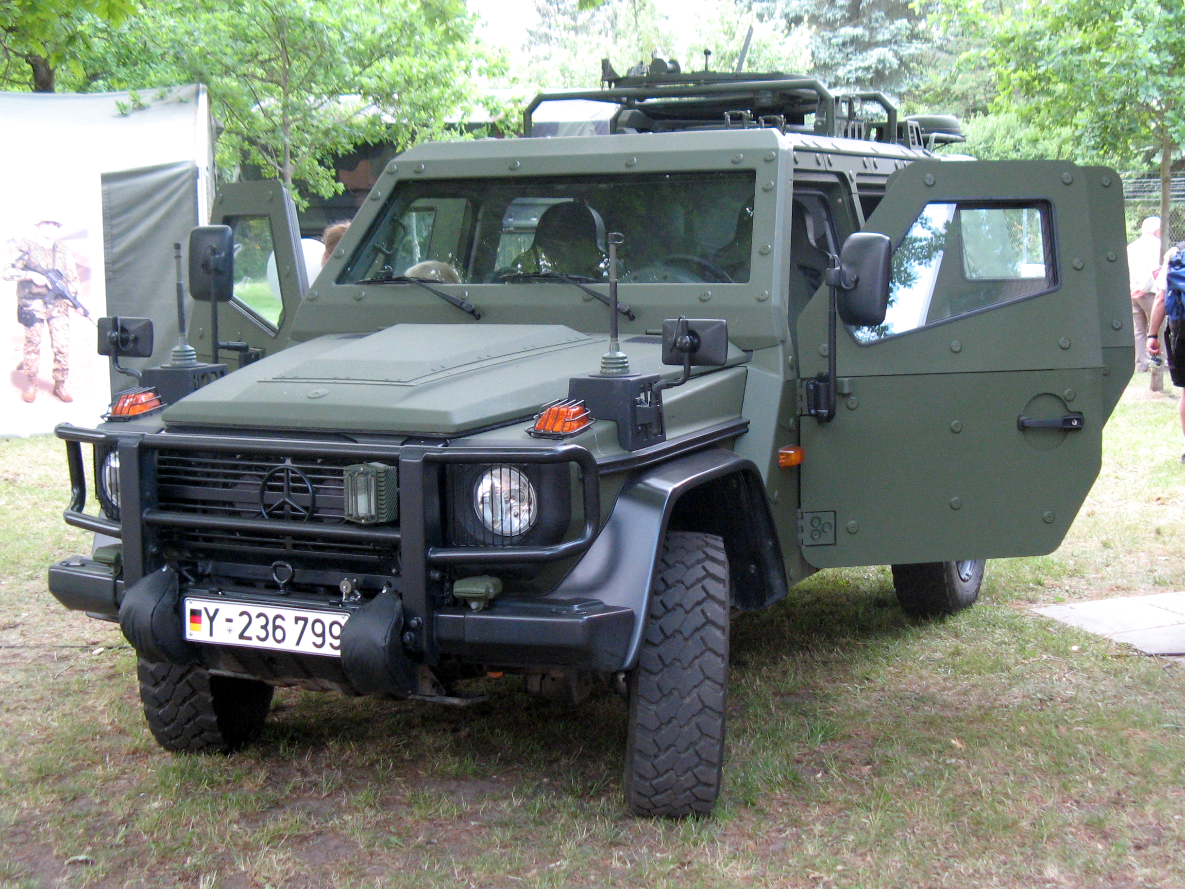 Bundeswehrfahrzeug LAPV Enok. Ausgestellt am Tag der offenen Tür der Bundespolizei (ehemalig Bundesgrenzschutz) anlässlich des 60 Jährigen Jubiläum.